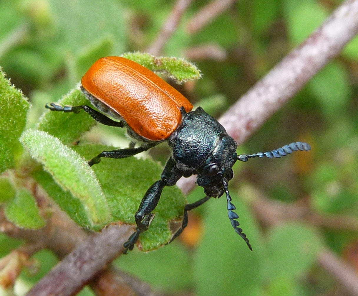 Labidostomis taxicornis. Male. Chrysomelidae